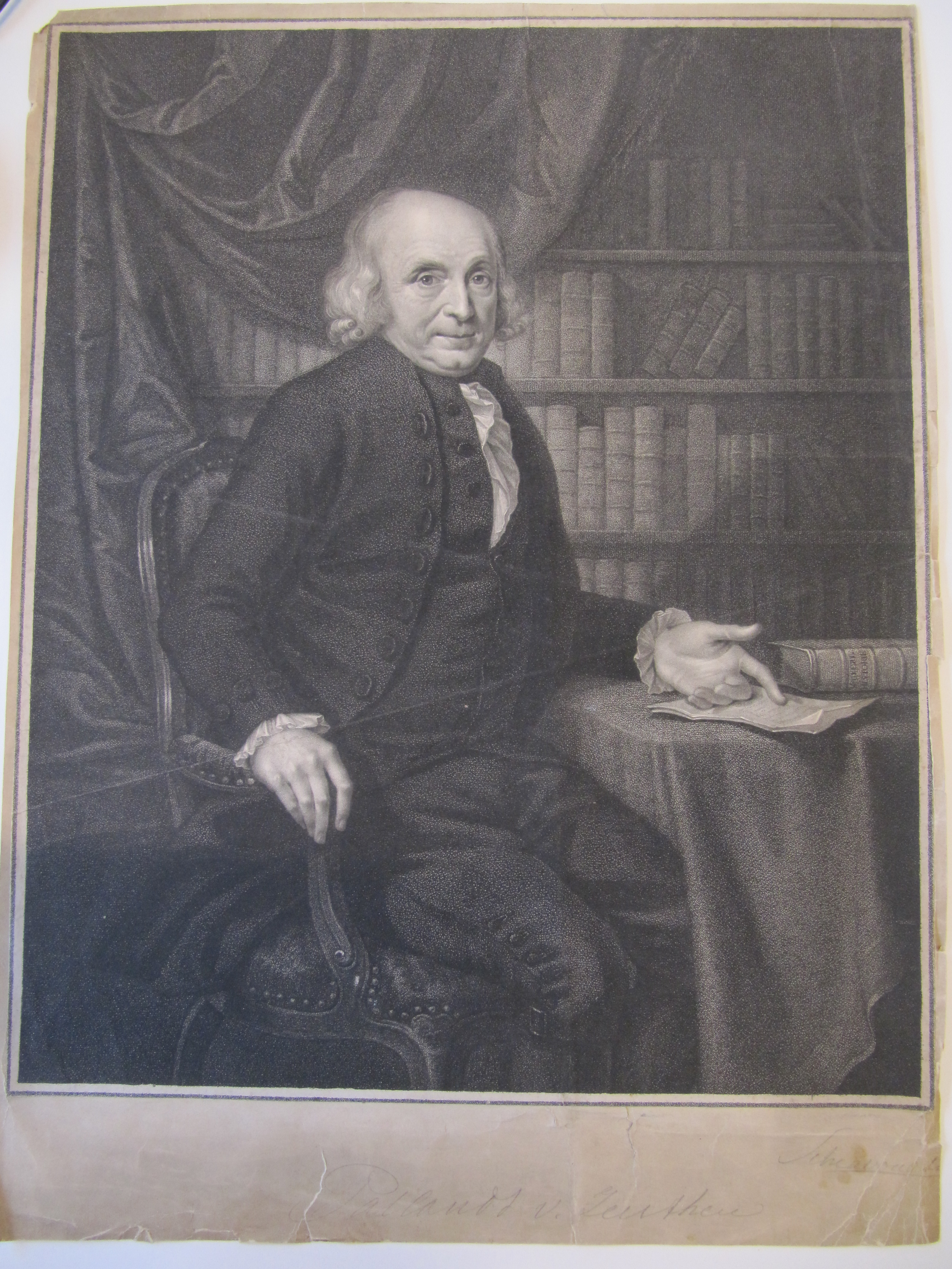 Adolph Warner Carel Wilhem van Pallandt 1733-1813